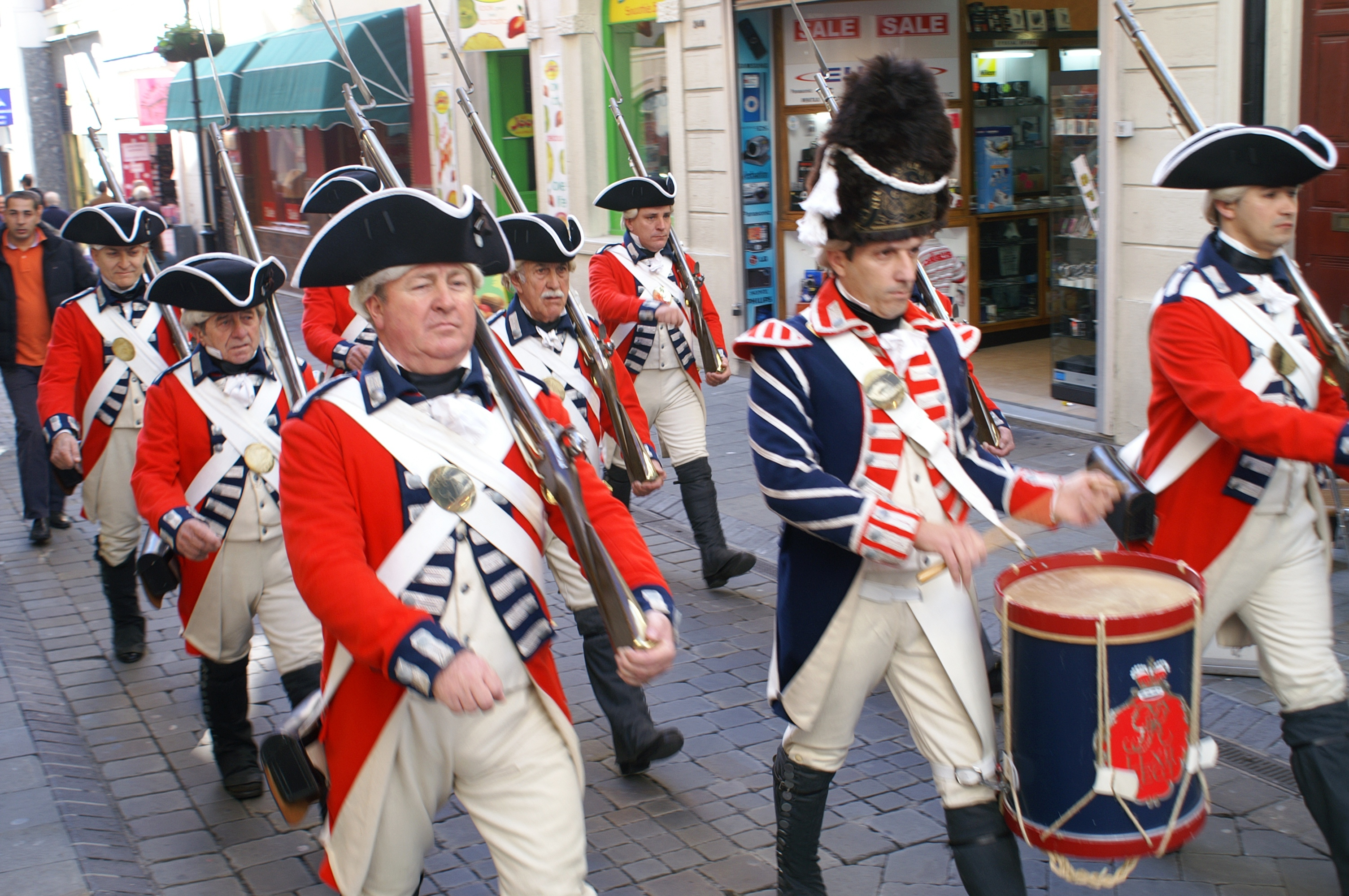 Gibraltar ©